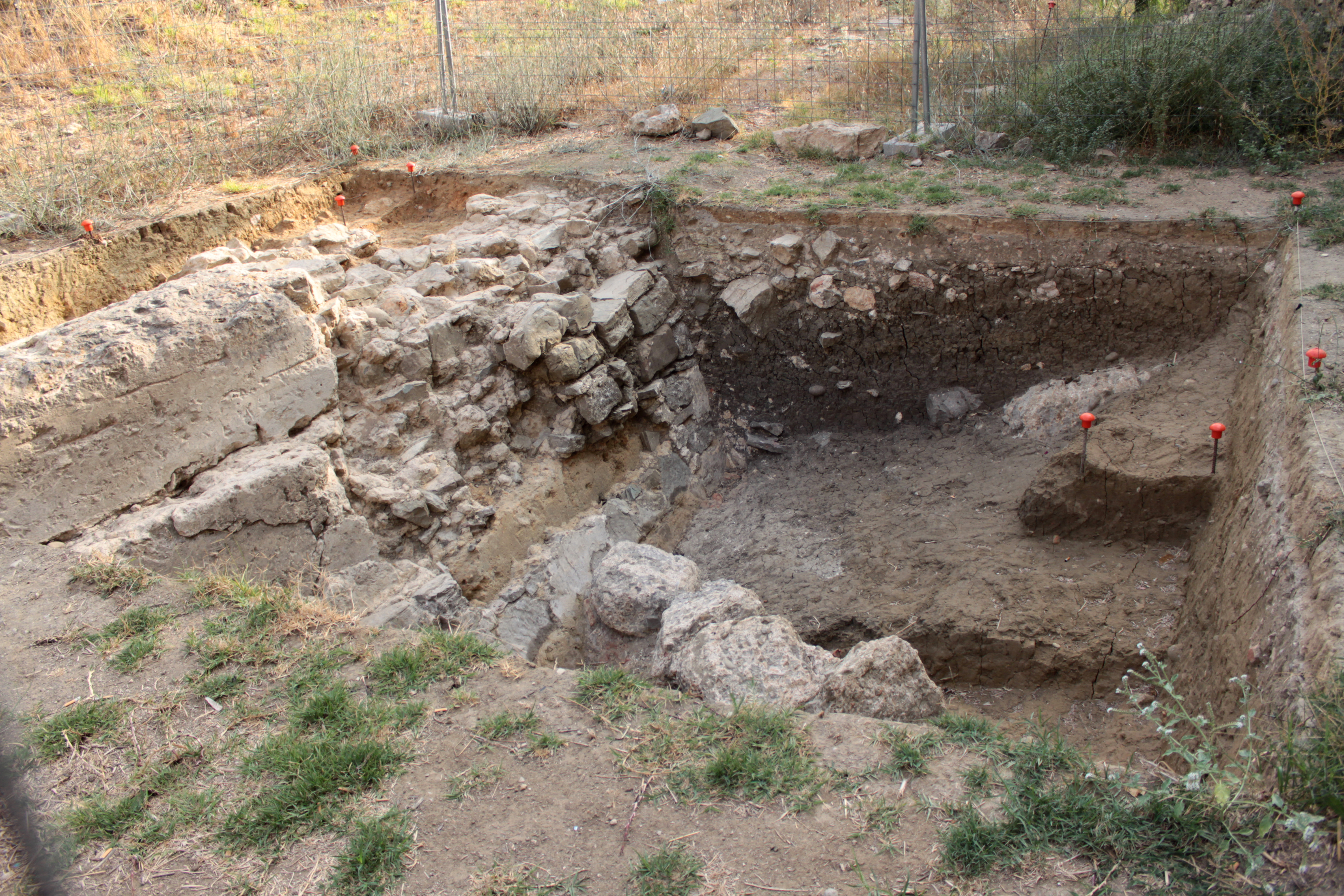 Huerta en Carmen de la localidad andaluza de Algeciras. Vista de la cata realizada en julio de 2017 donde se observa la segunda barbacana del complejo.